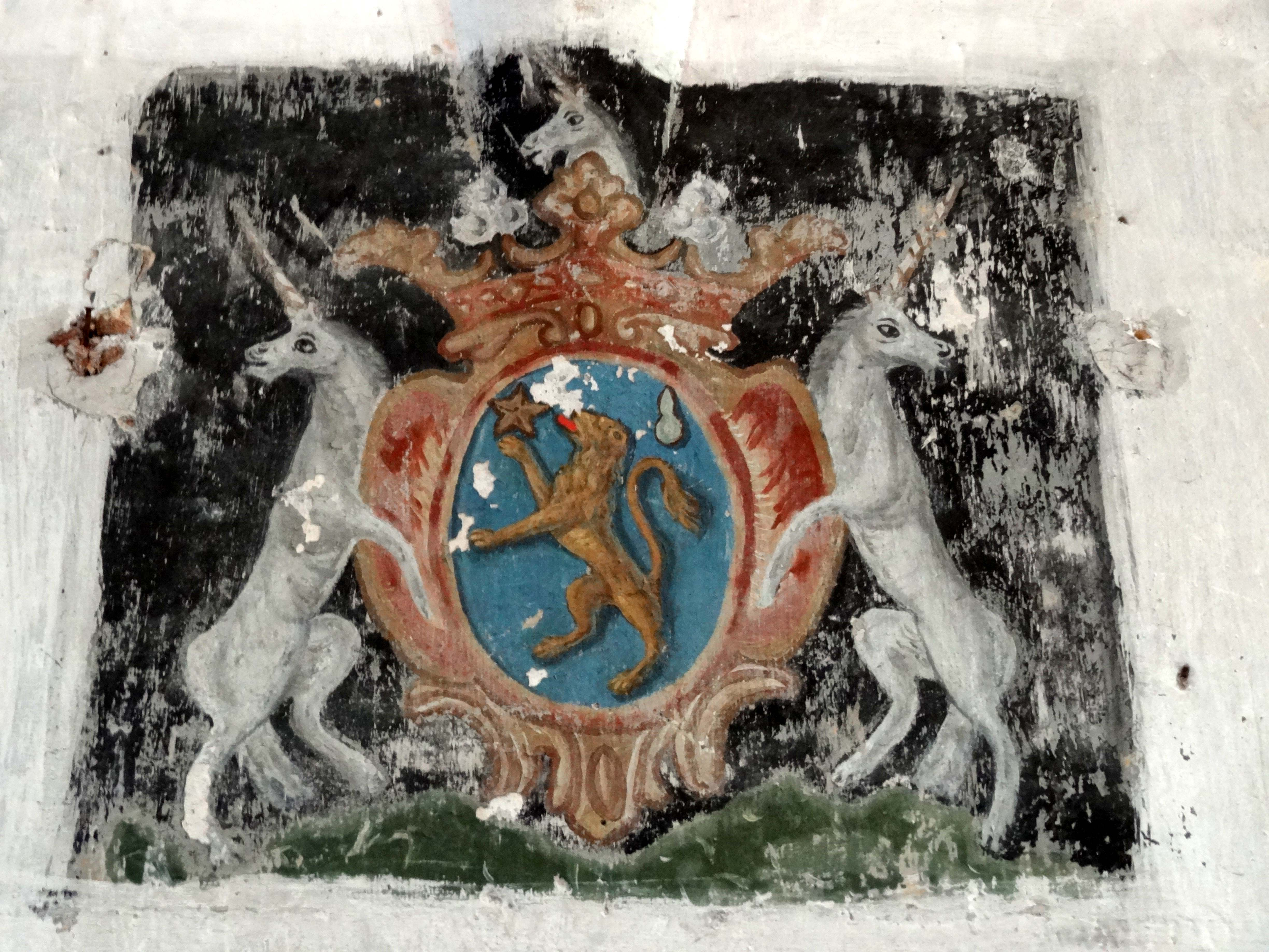 Intérieur de l'église - voir titre.